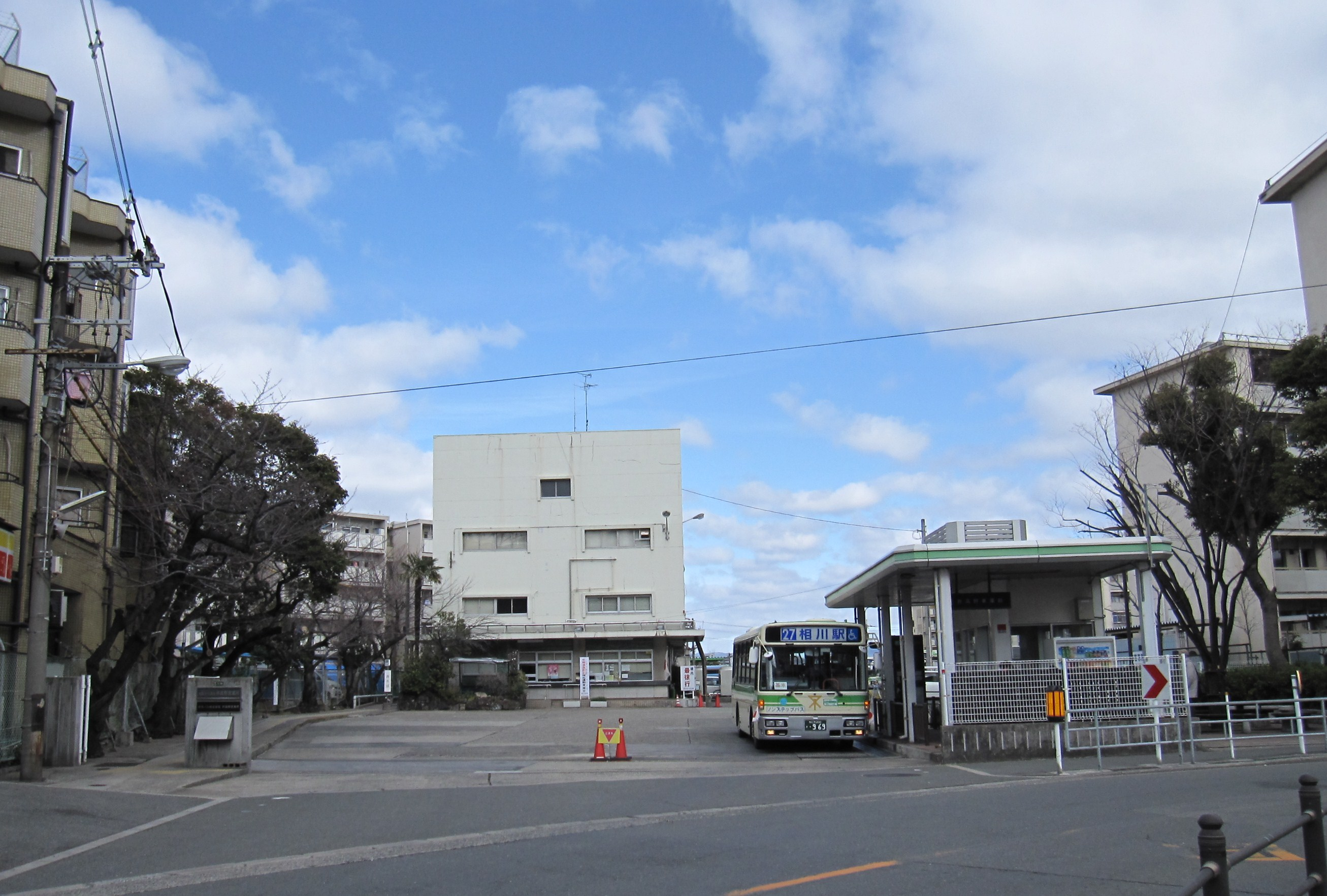 大阪市営バス井高野営業所